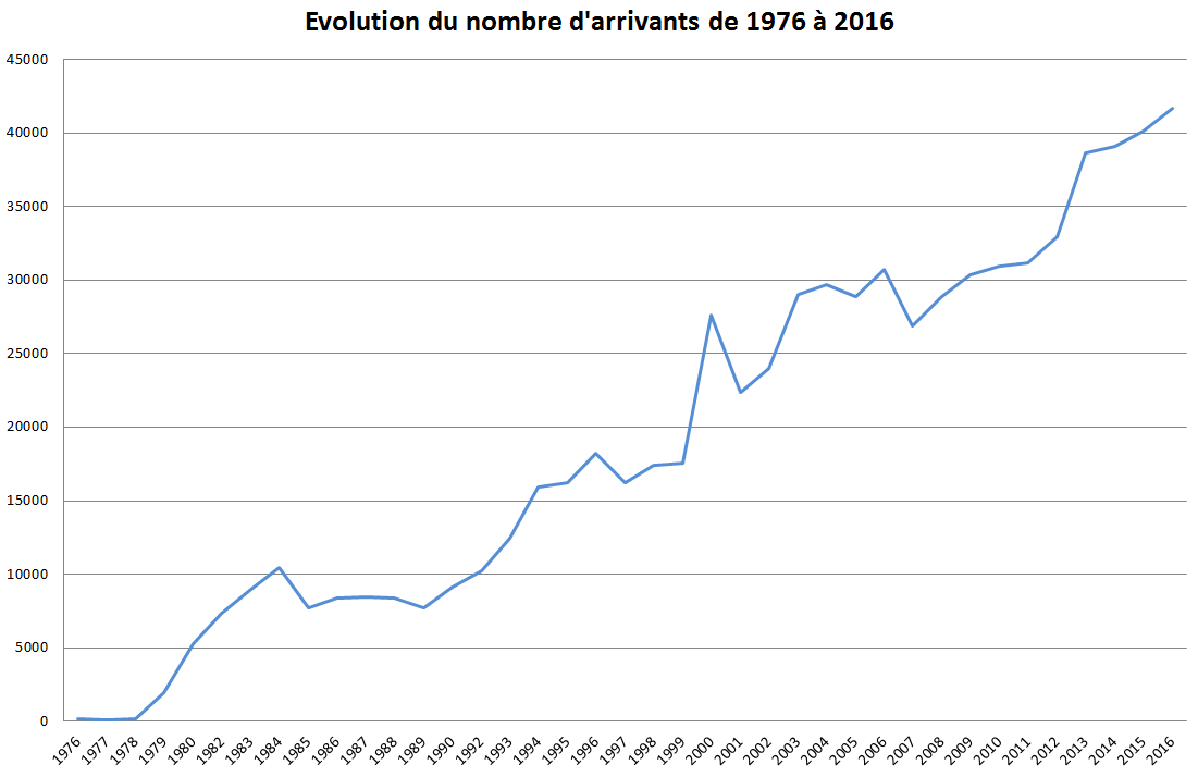 Evolution du nombre de concurrents terminant le marathon de Paris de 1976 à 2015.